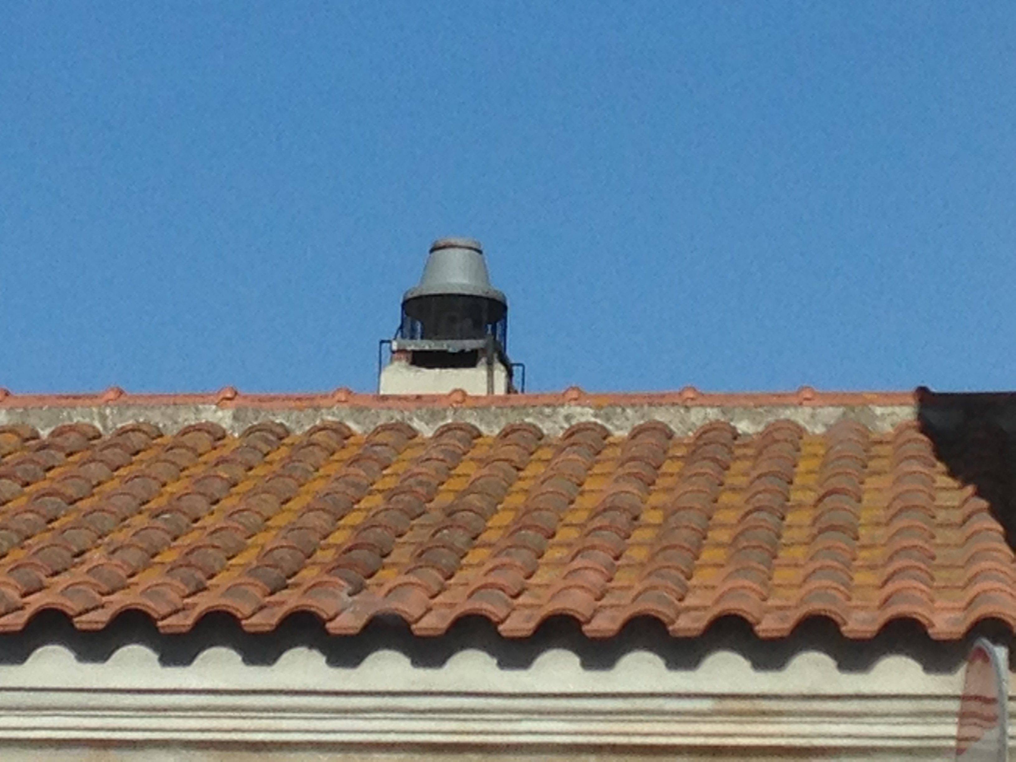 Tiracamino sul tetto di una casa